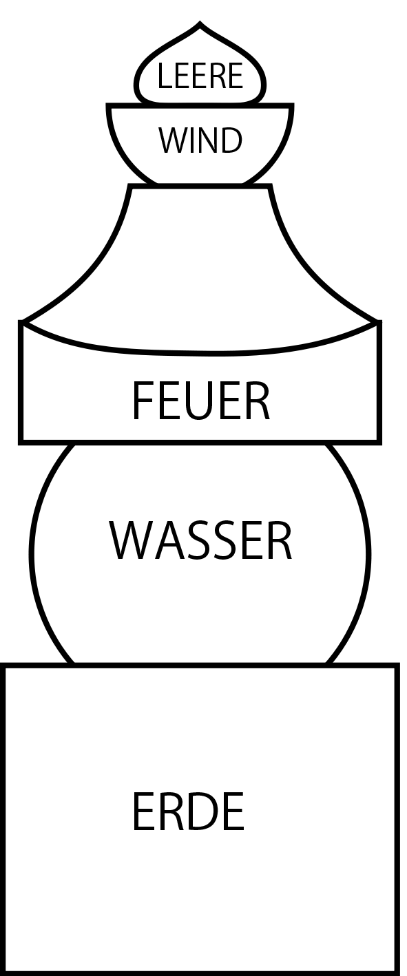 Fünfringige Stupa, japanisch Gorintō